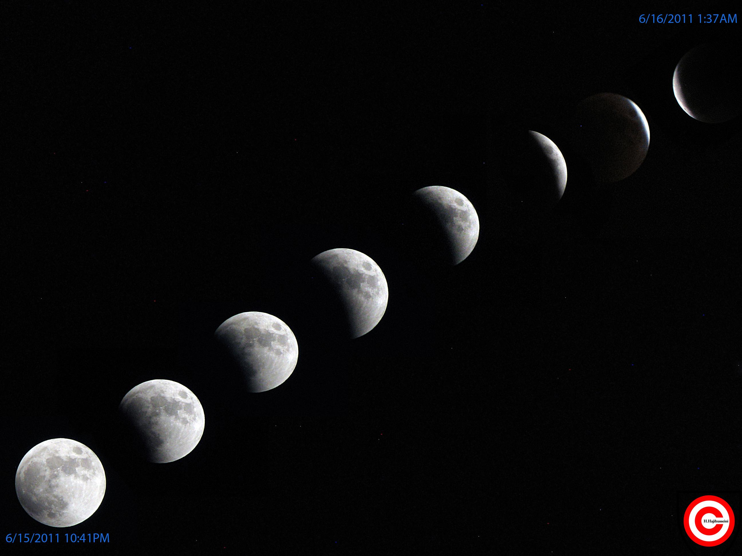 Mondfinsternis 2011- Arak-Iran